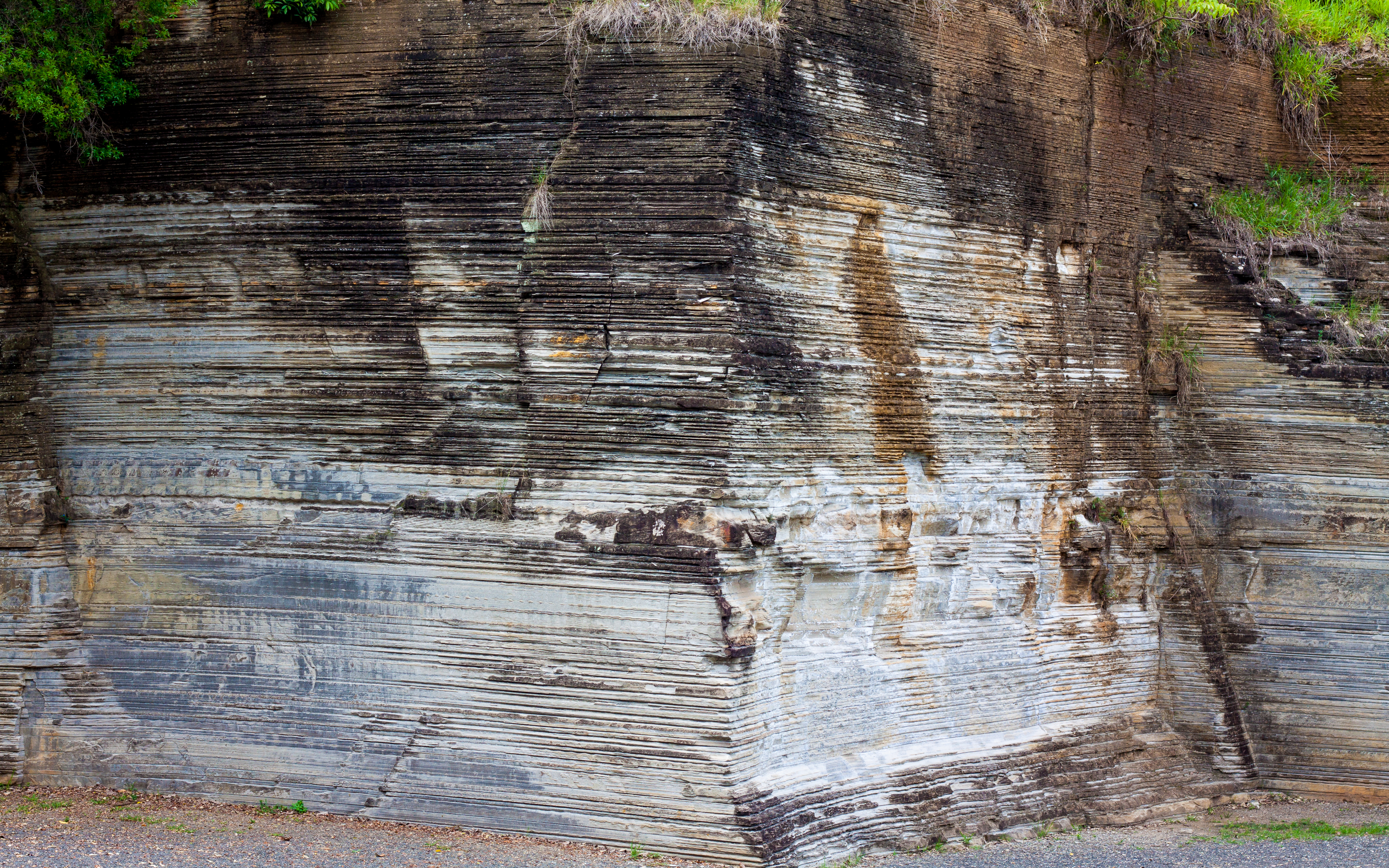 Parque Geológico do Varvito